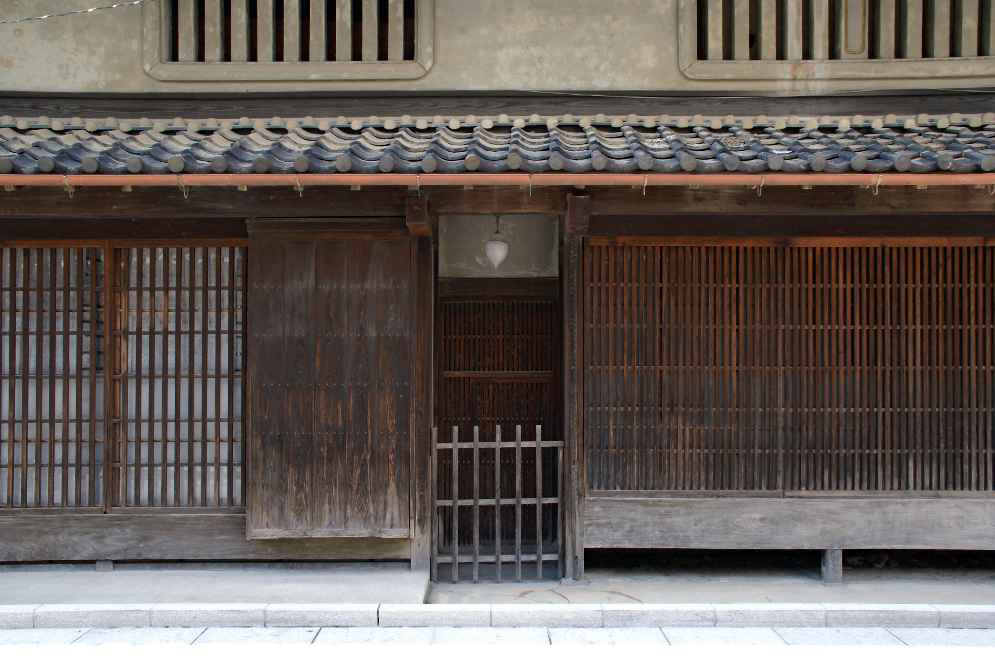 Matsuyama in Uda, Nara prefecture, Japan